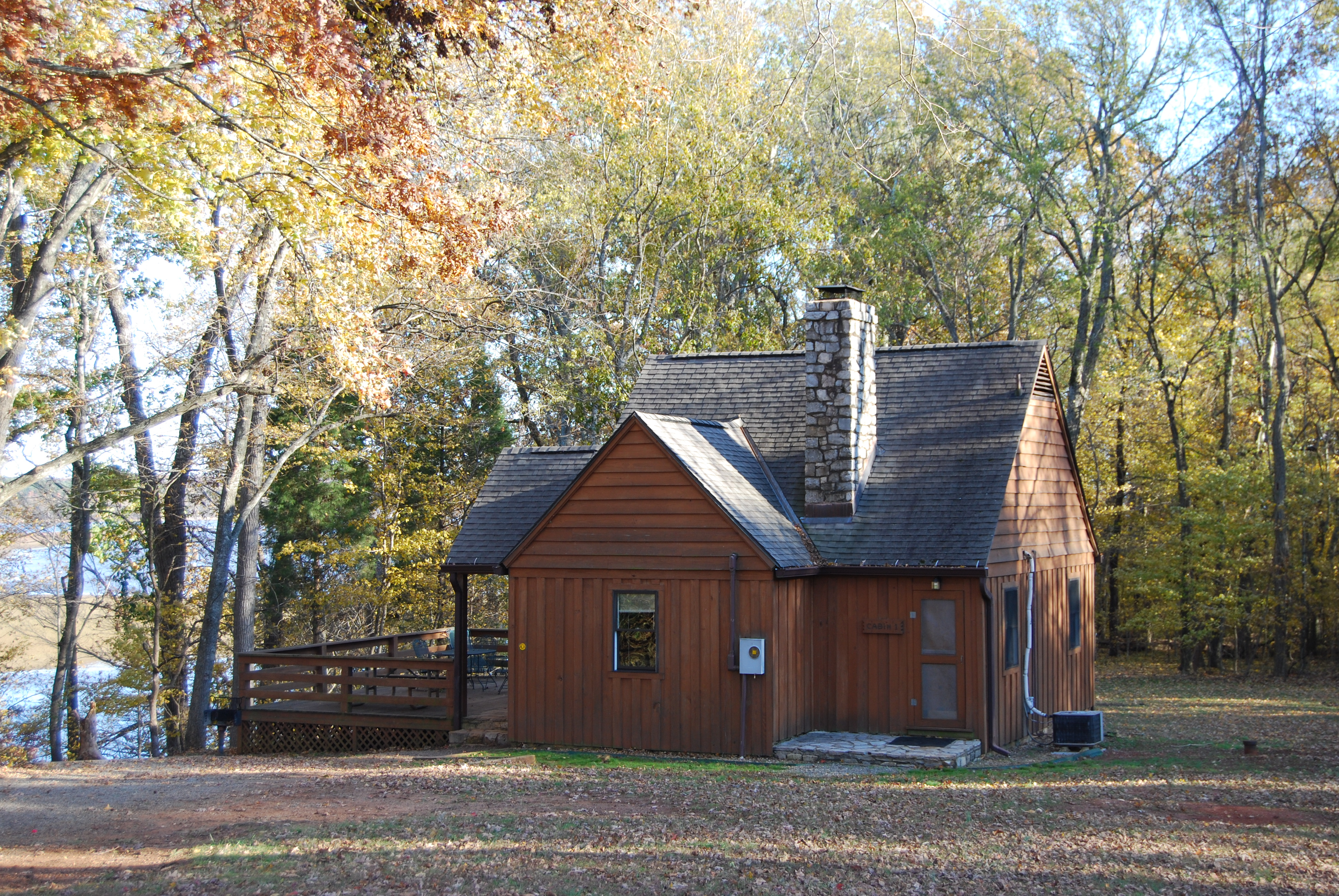 By SA. used in blog.